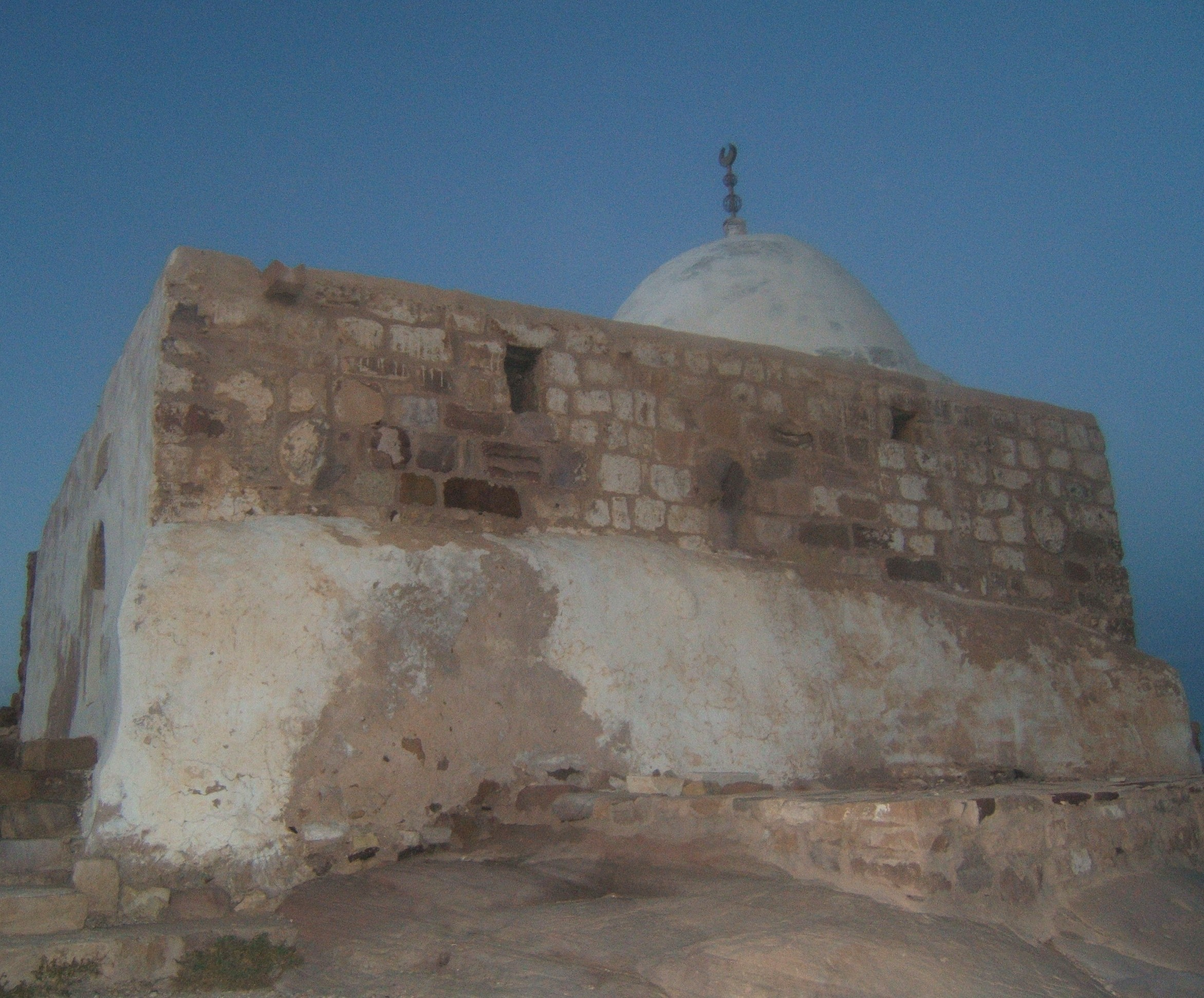 קבר אהרן הכהן